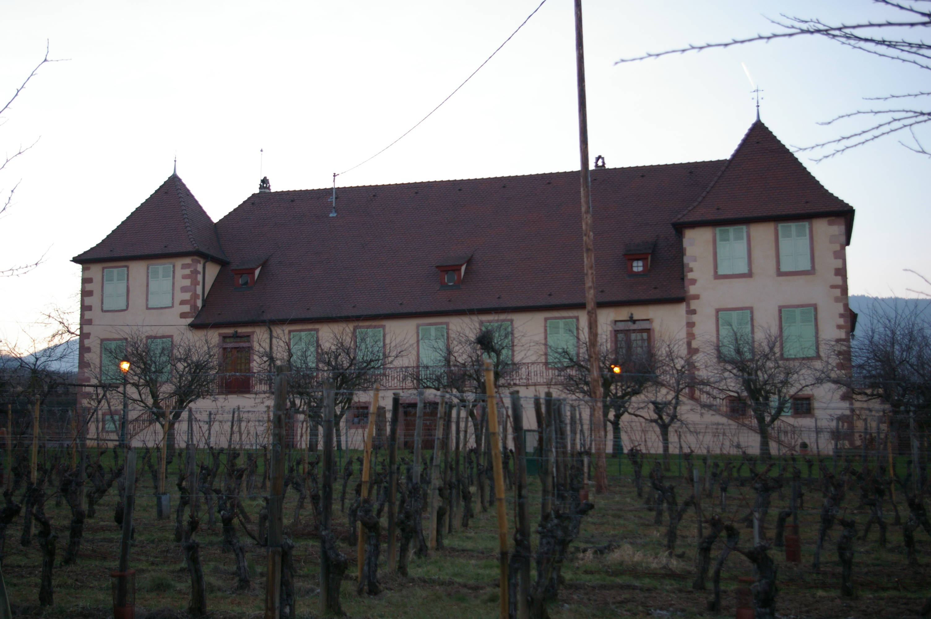 Corps de logis du domaine du Bouxhof à Mittelwihr (Haut-Rhin, France).